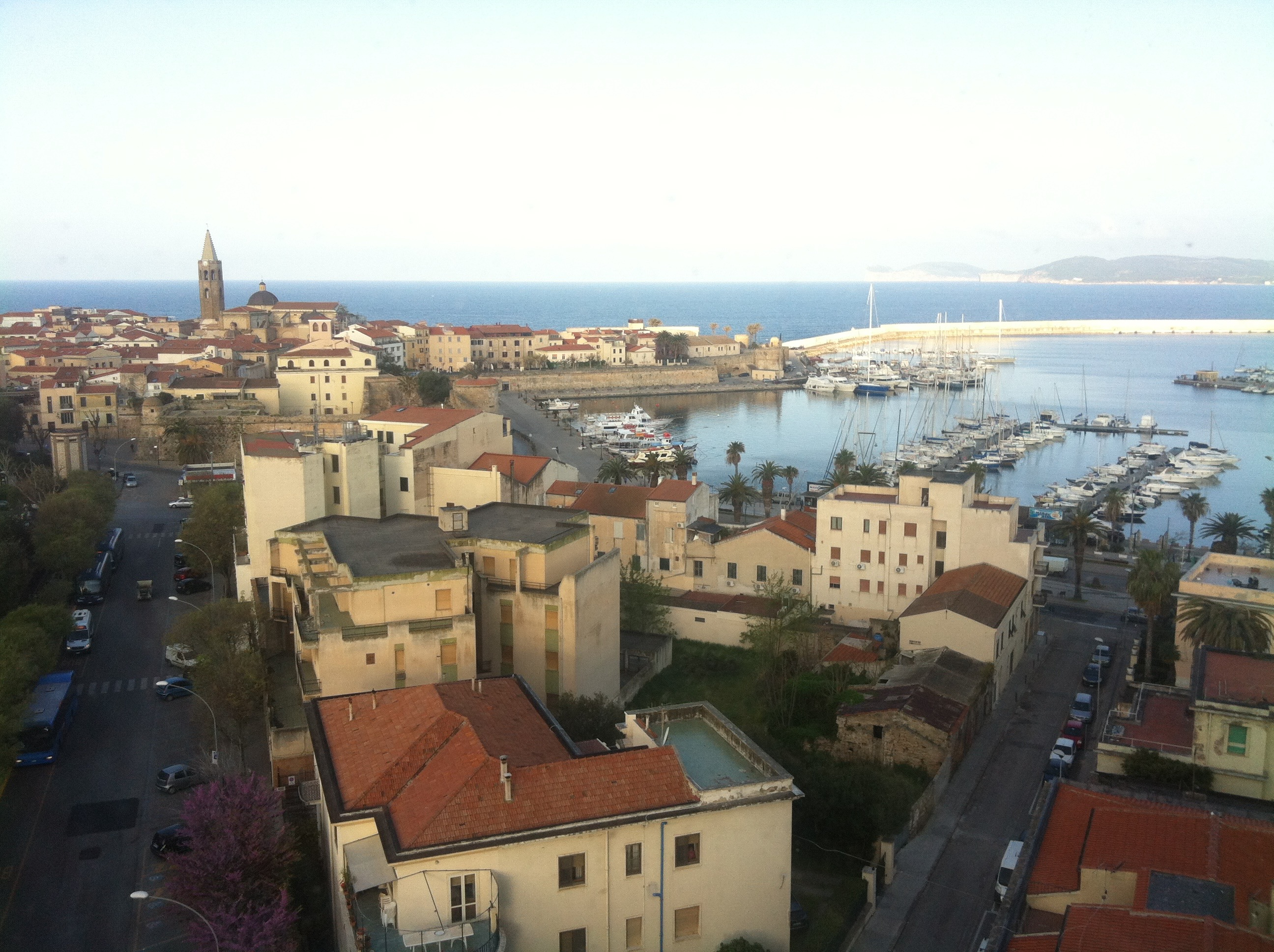 Presentació Bibliowikis a L'Alguer